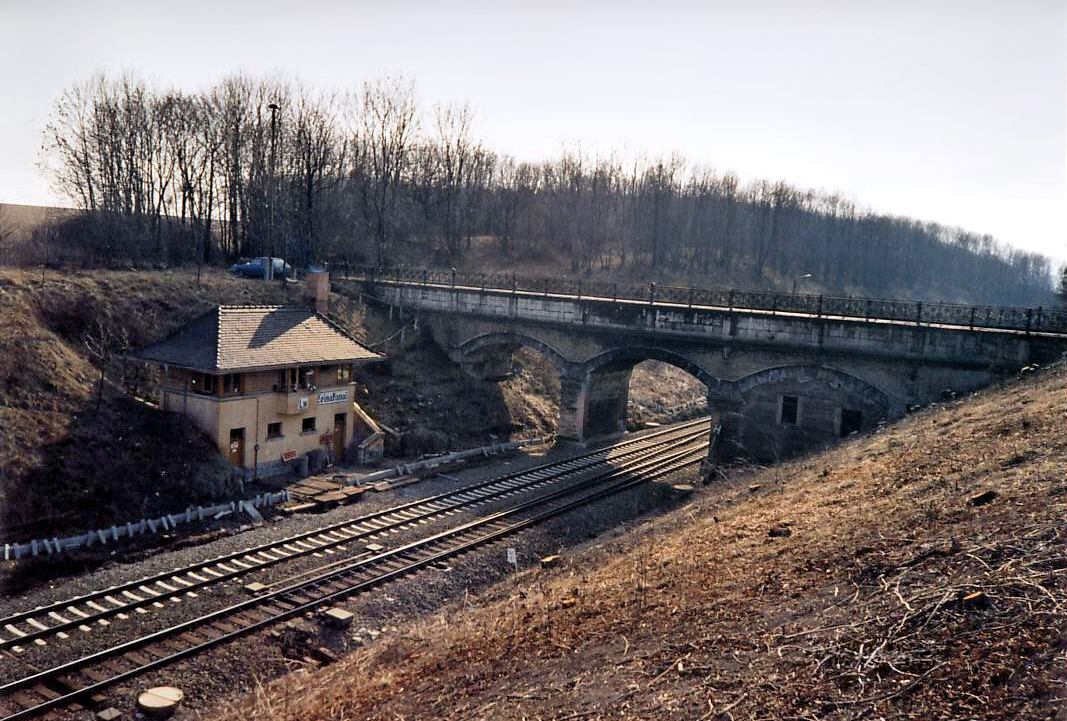 Leinakanal-Aquädukt mit Blockstelle Leinakanal und alter Bahnlinie